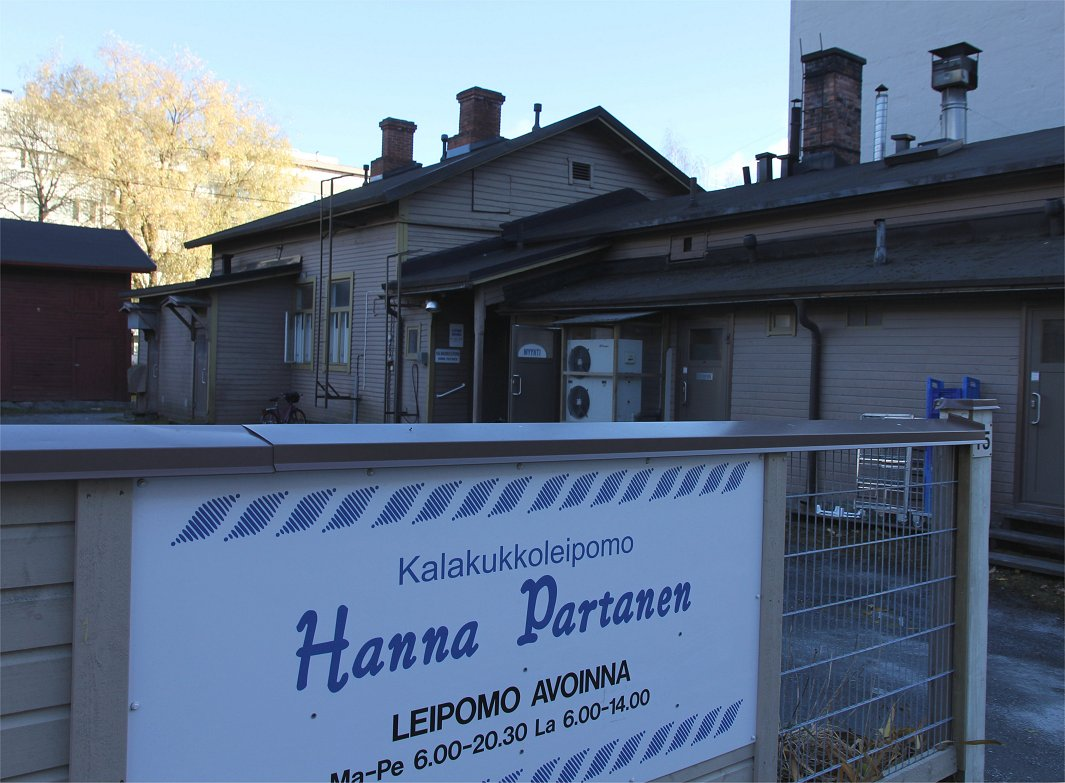 Hanna Partanen (1891–1969) oli Suomen kuuluisin kalakukkoleipuri. Kukkoja tehdään edelleen perinteisen tavan mukaan käsityönä ja suomalaisista raaka-aineista (tärkein suomalainen ruis) Kuopion keskustassa Kasarmikadulla sijaitsevassa leipomossa. Hanna Partasen nimeä kantava leipomo työllistää vuodenajoista riippuen 10–20 työntekijää.